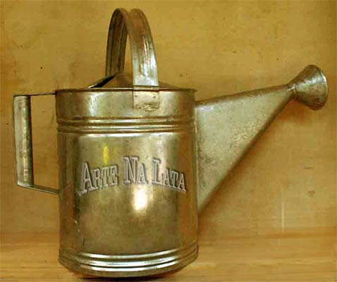 Regador Galvanizado Primitivo